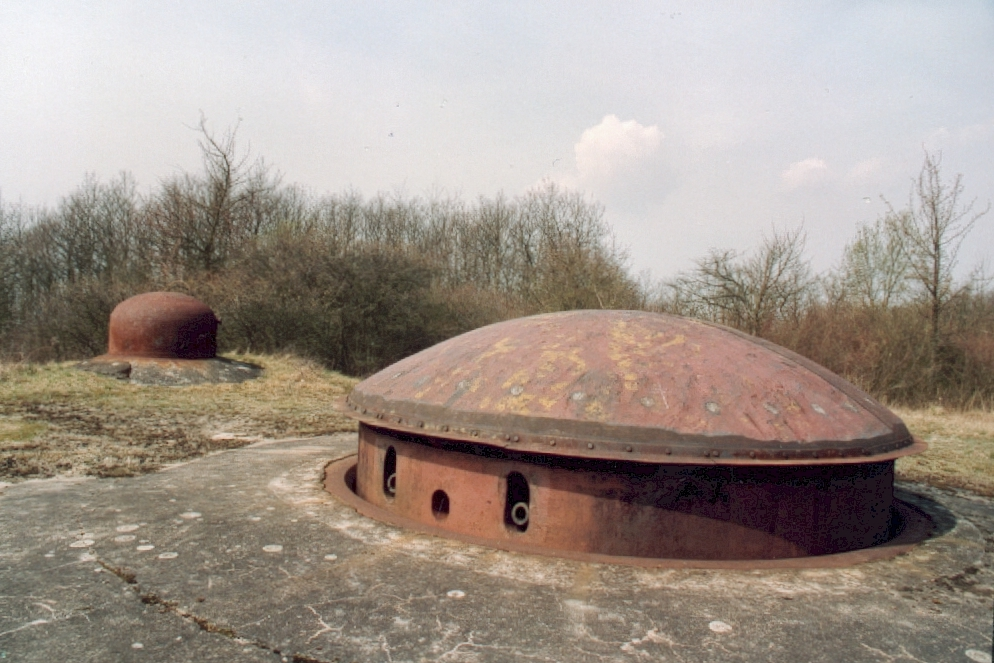 7,5 cm Kanone, Artilleriewerk Metrich, Block 8, Maginot-Linie